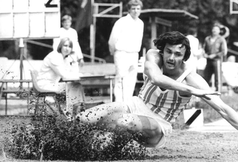 Rainer Pottel ADN-ZB Lehmann 24.5.81 Halle: Bei den 32. DDR-Meisterschaften im Leichtathletik-Mehrkampf der Männer wurde neuer Titelträger Rainer Pottel (TSC Berlin) mit 8161 Punkten. Im zweiten Durchgang des Weitsprungwettbewerbes der Zehnkämpfer sprang er 7,50 Meter.